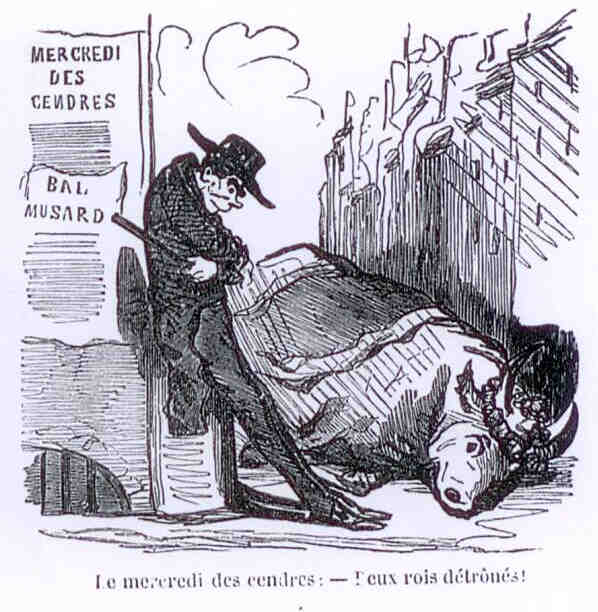 Le bœuf gras et Philippe Musard détrônés par la fin du Carnaval der Paris.